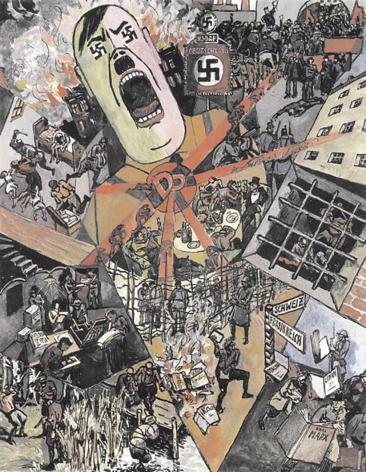 Heinrich Vogeler: Das Dritte Reich, Gouache, 1934, Puschkin-Museum, Moskau